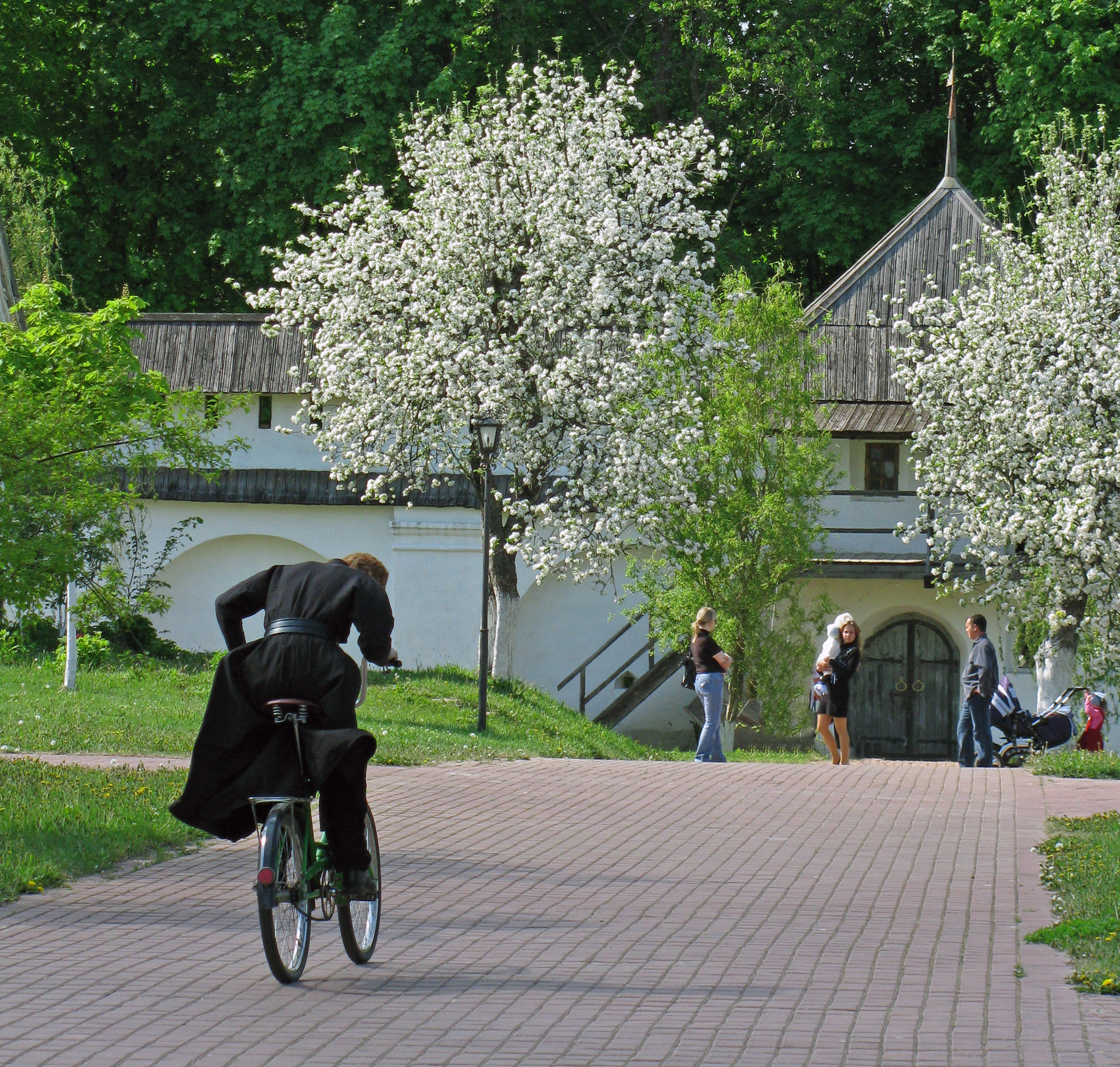 Спасо-Преображенський монастир, Новгород-Сіверський, вул.Пушкiна, 1